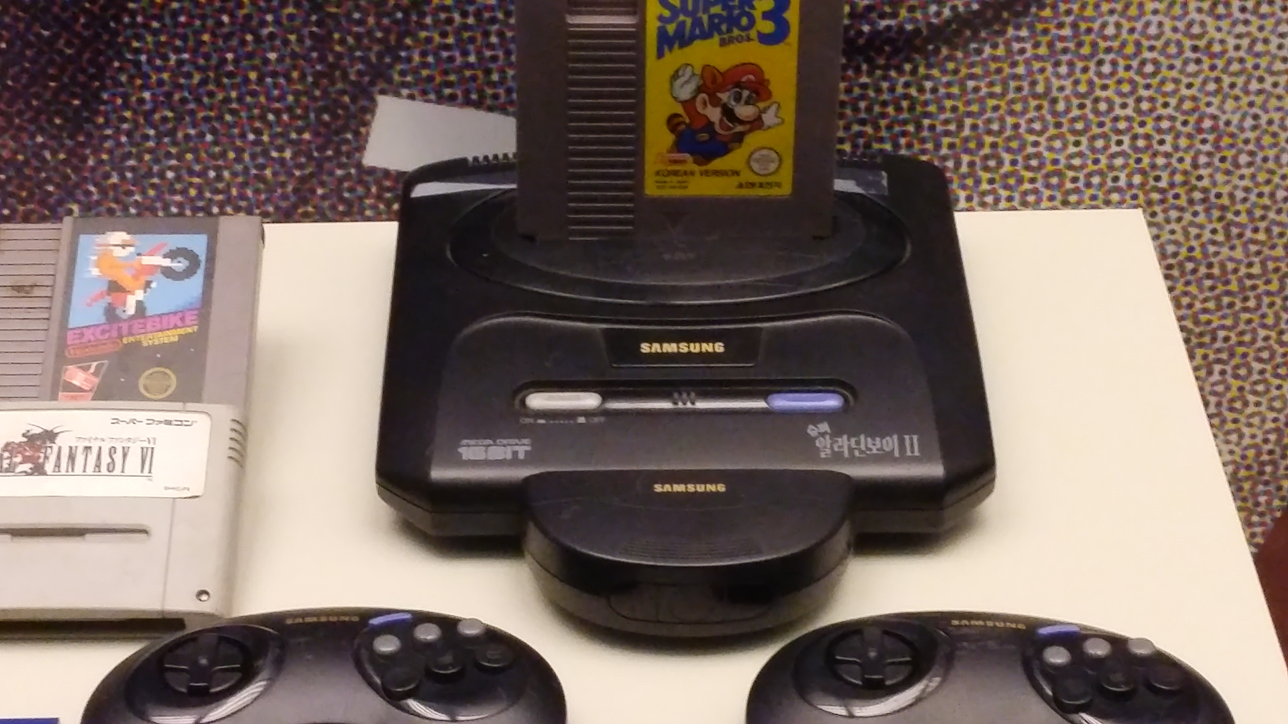 Der südkoreanische Samsung Super Aladdin Boy II, lizensiert von Sega. Aufnahme im Seoul Museum of History.